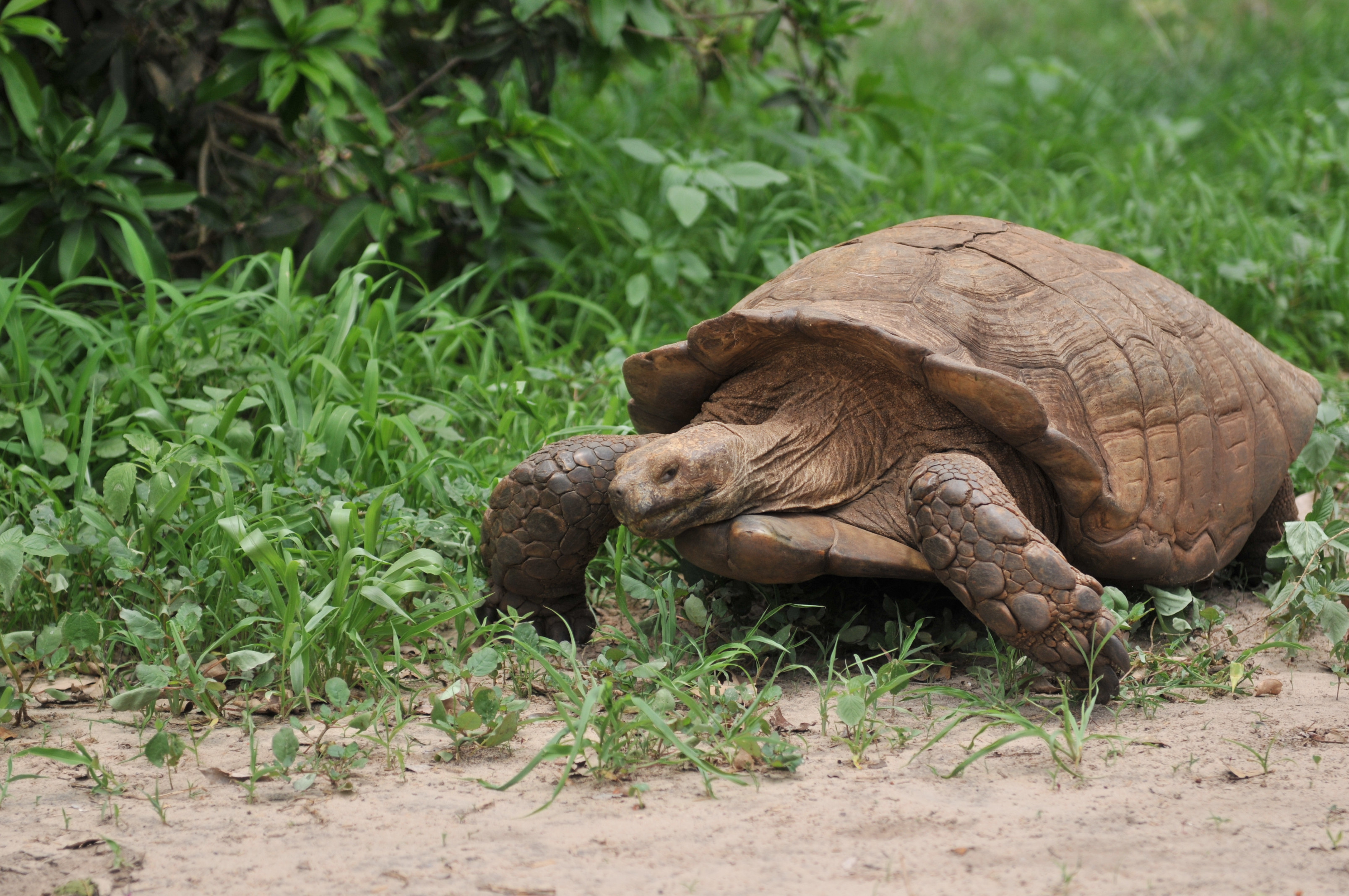 Tortue sénégalaise au village des tortues près de Rufisque